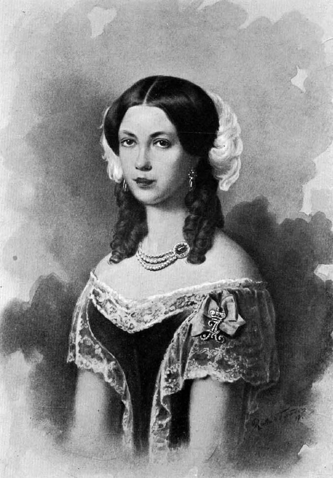 Мария Павловна Родзянко, ур. Витовтова (1827-1859), фрейлина, с 1850 года жена В.М.Родзянко (1820-1893).